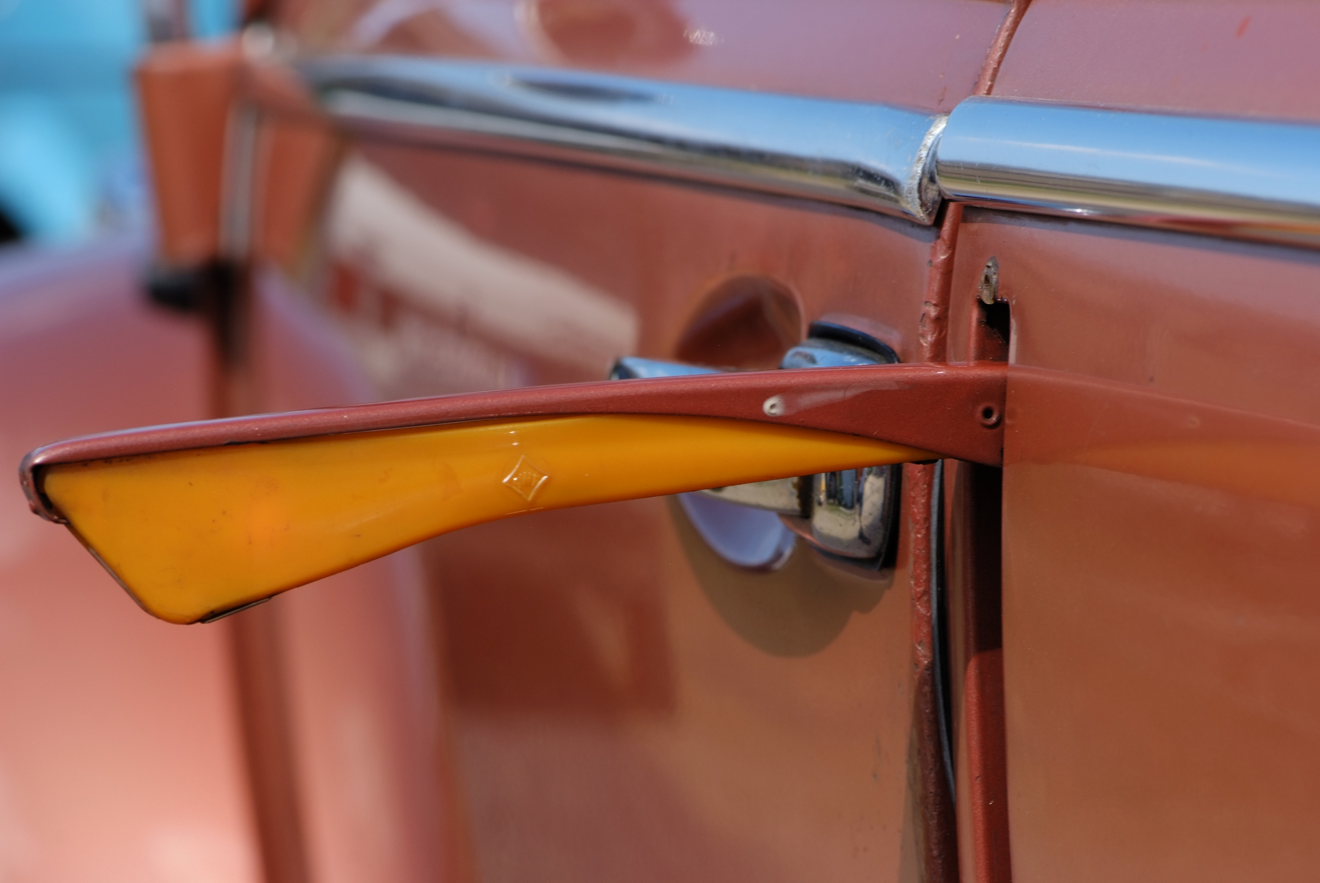 VW Käfer Karmann-Cabriolet, Baujahr 1956, Typ 1/15